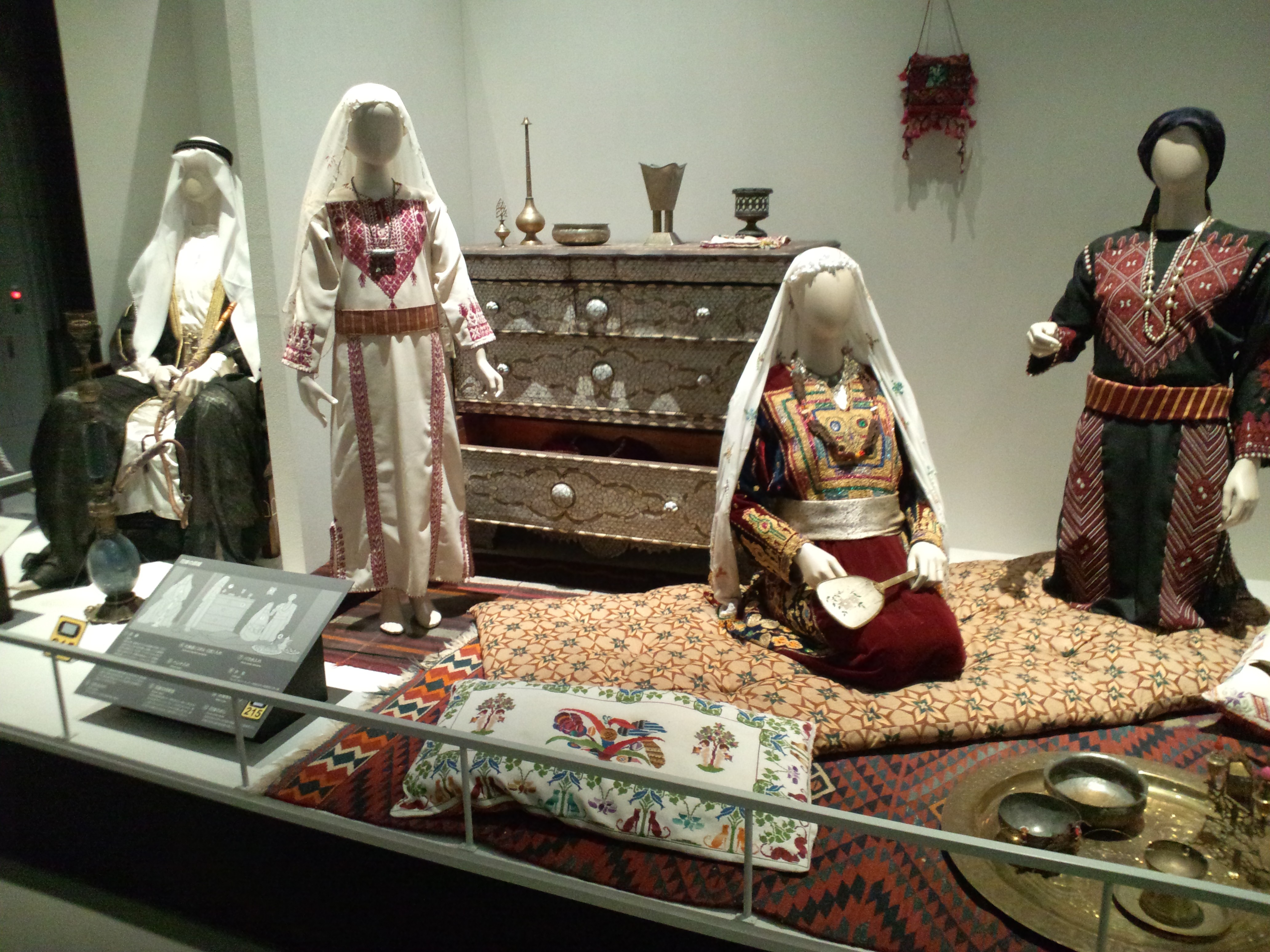 国立民族学博物館（大阪） 花嫁の部屋（パレスチナ、ディアスポラ）